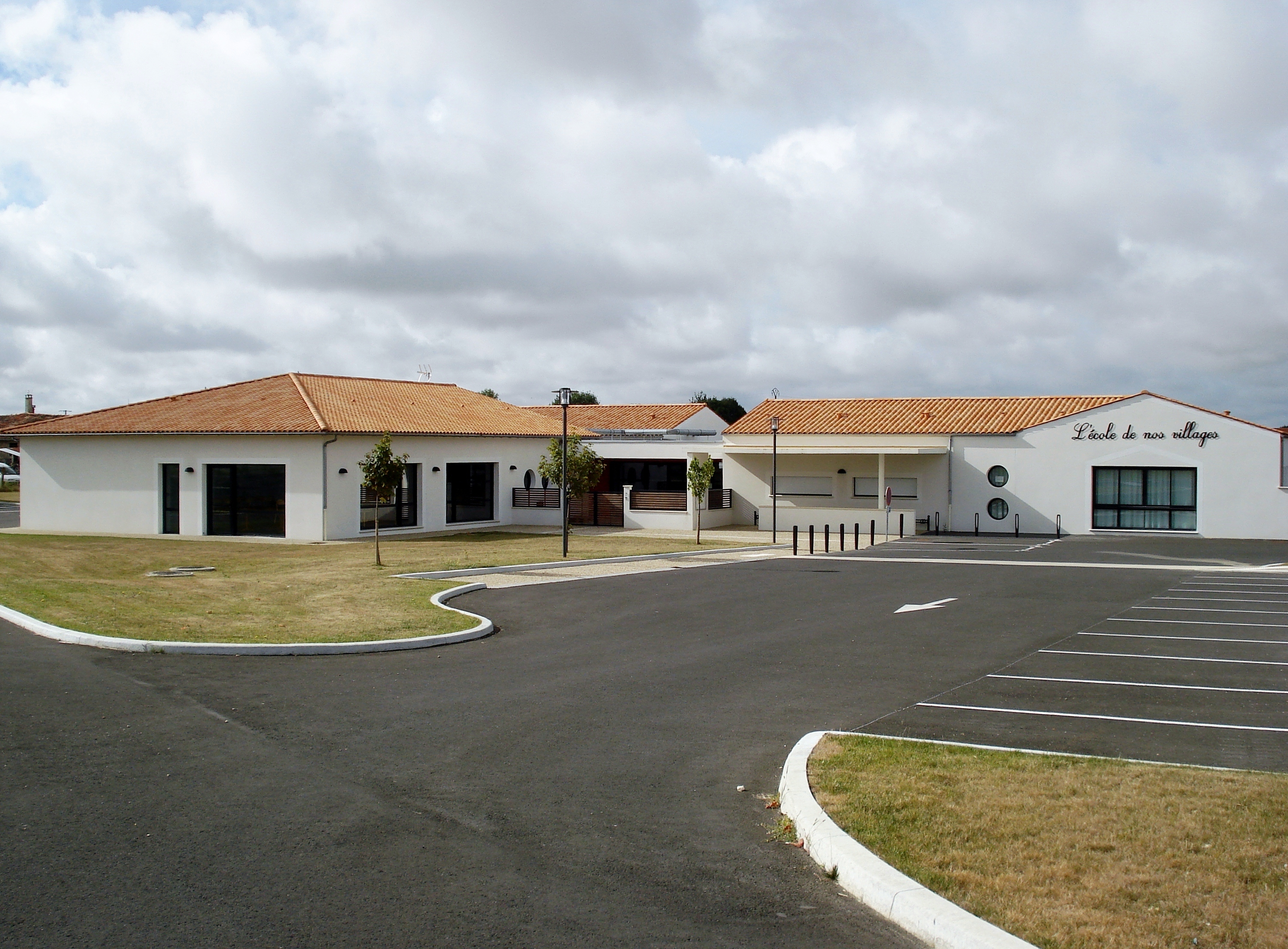 Nouvelle école de Néré en Charente-Maritime